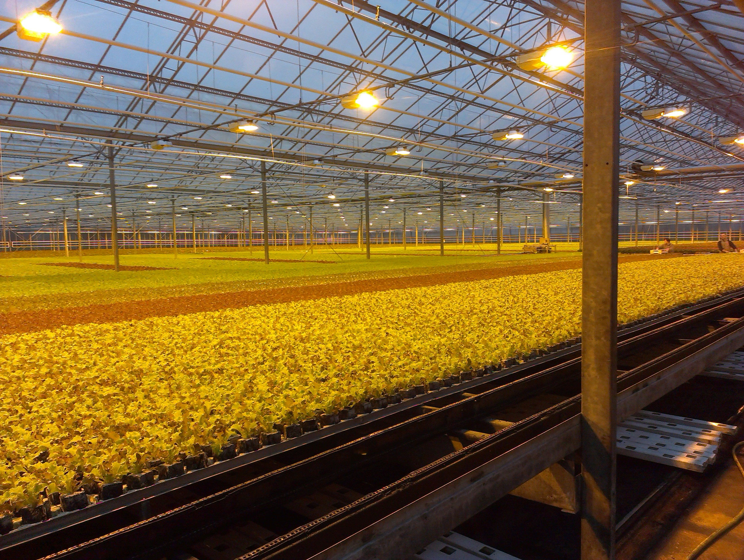 slateelt